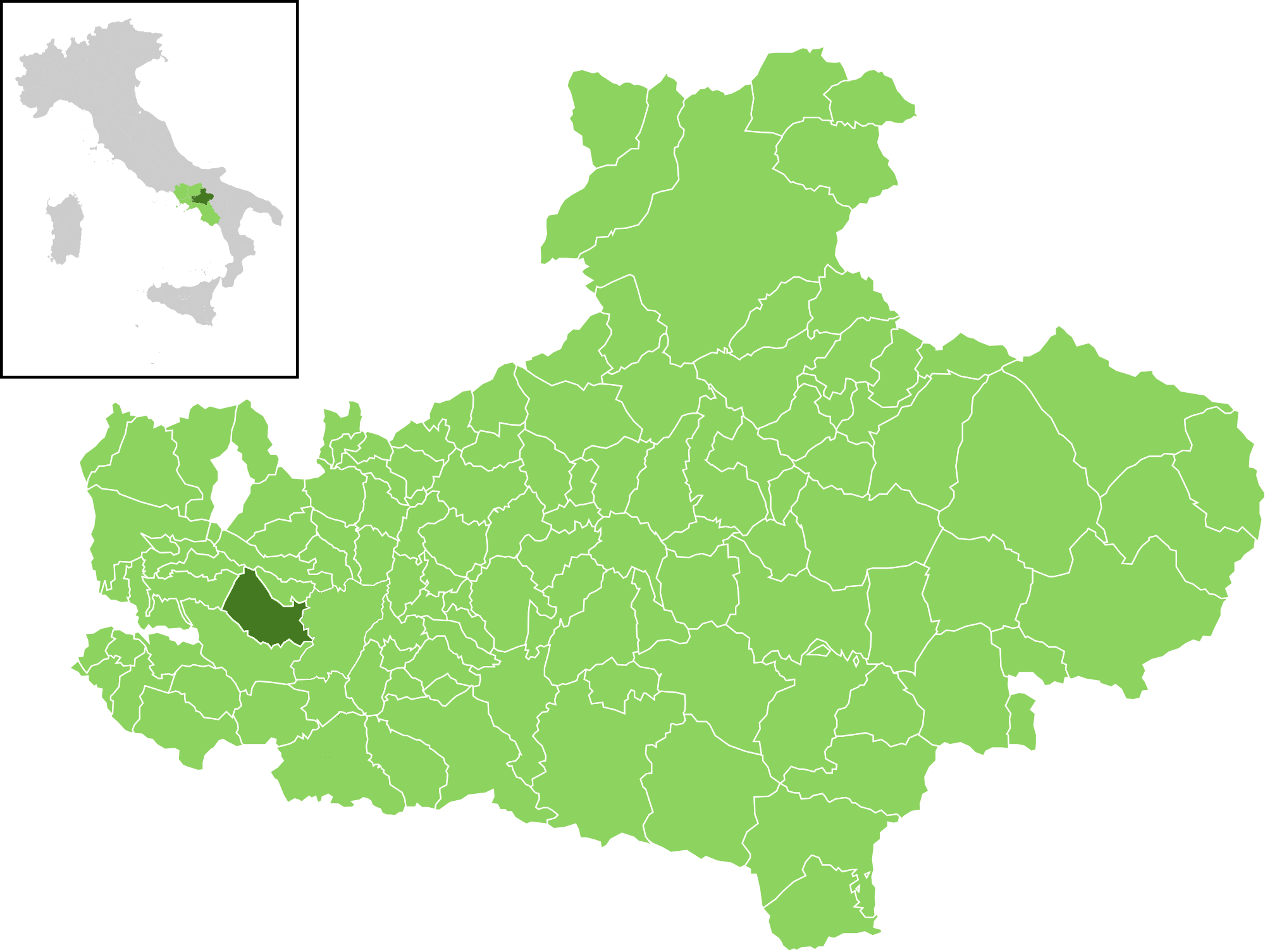 Posizione del comune all'interno della provincia di Avellino